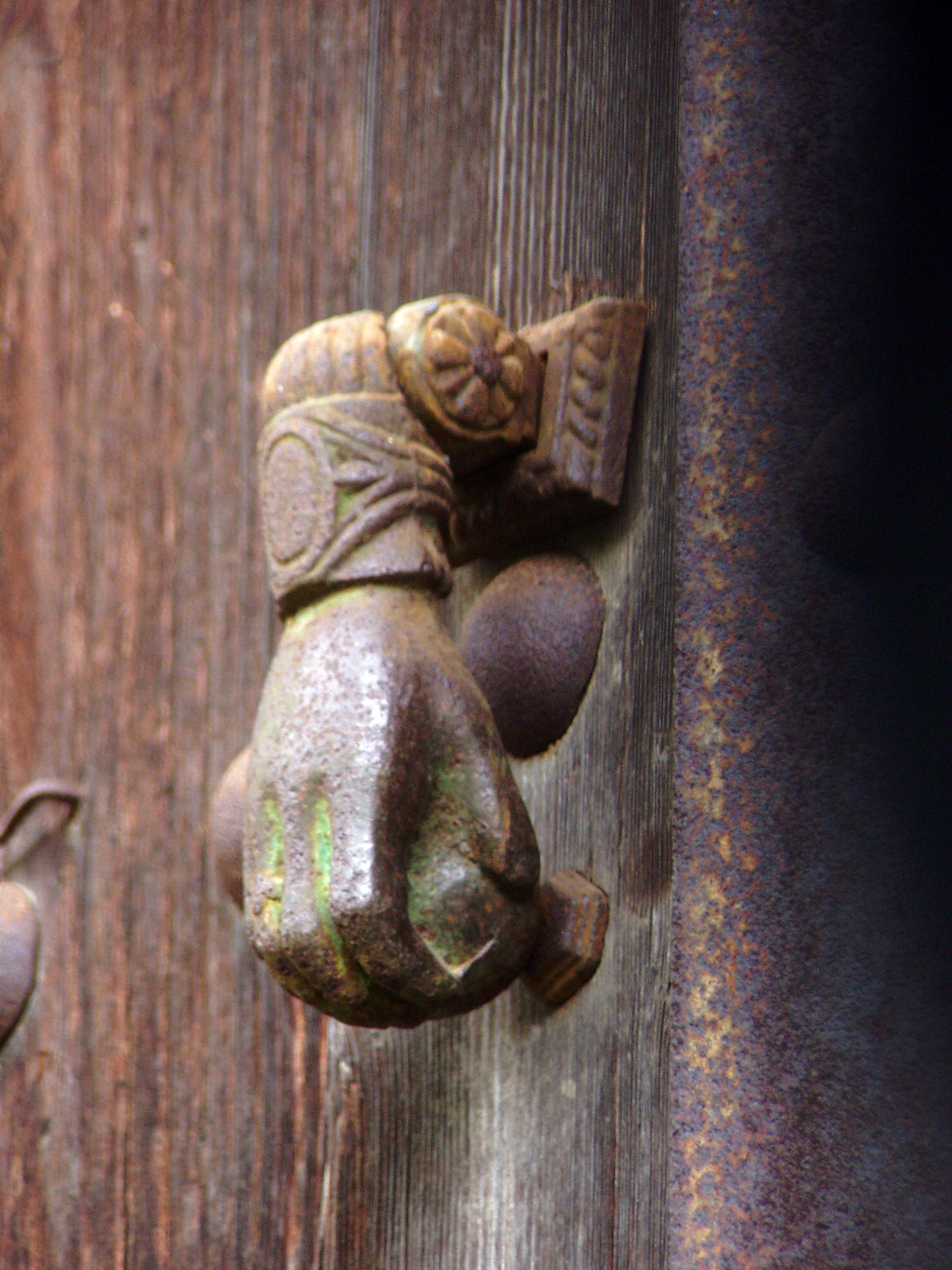 Метално тропало на влезна порта на куќа